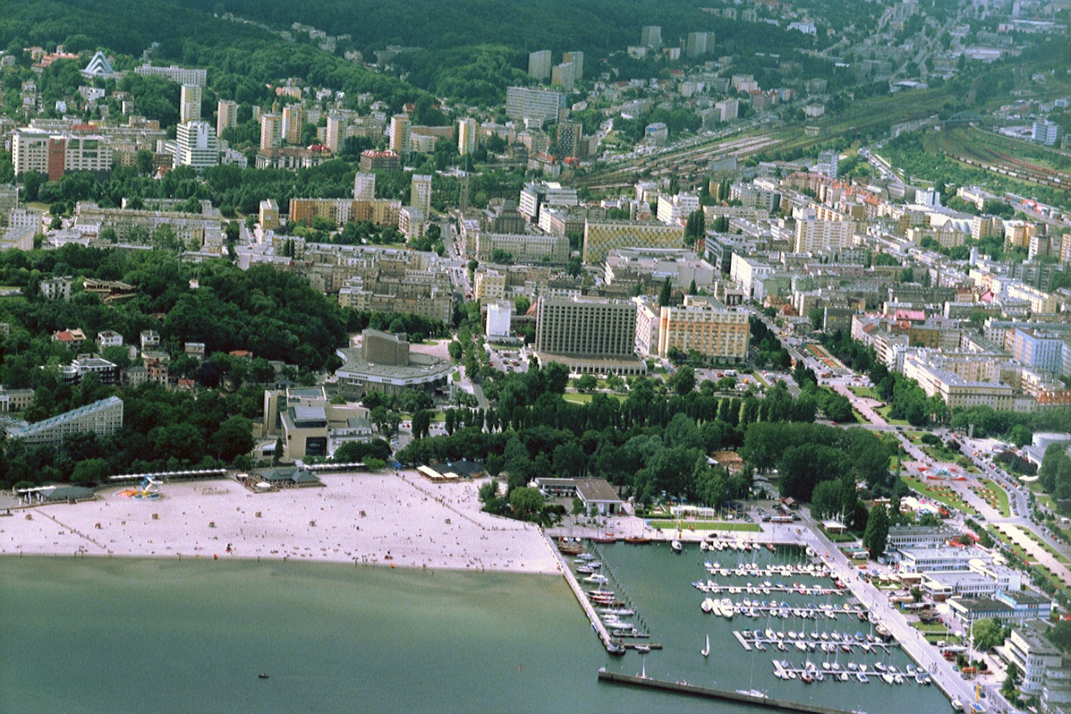 Gdynia. Skwer Kościuszki. Basen jachtowy i plaża miejska